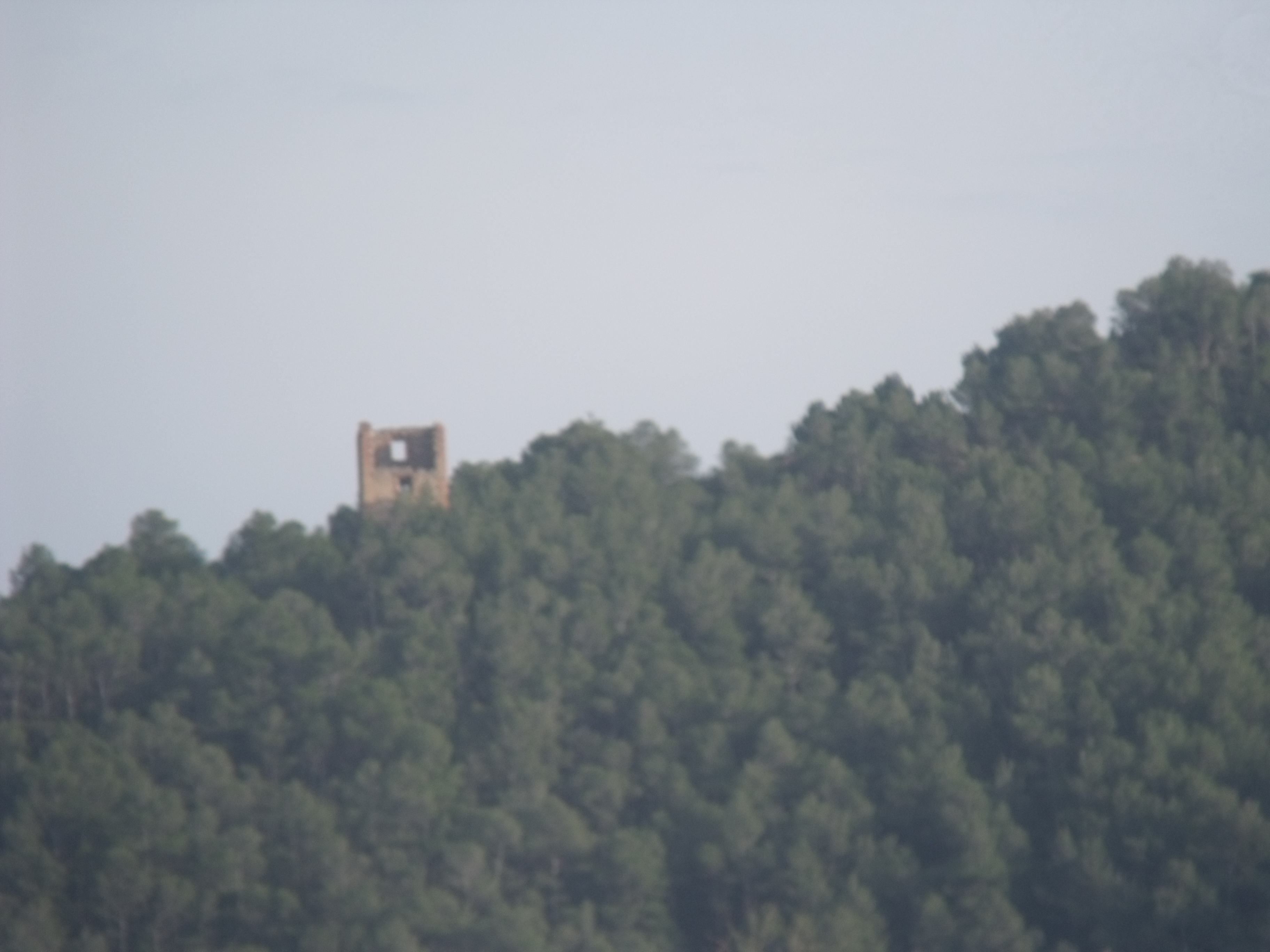 Vista de lejos de la Torre de telegrafía óptica de Buñol